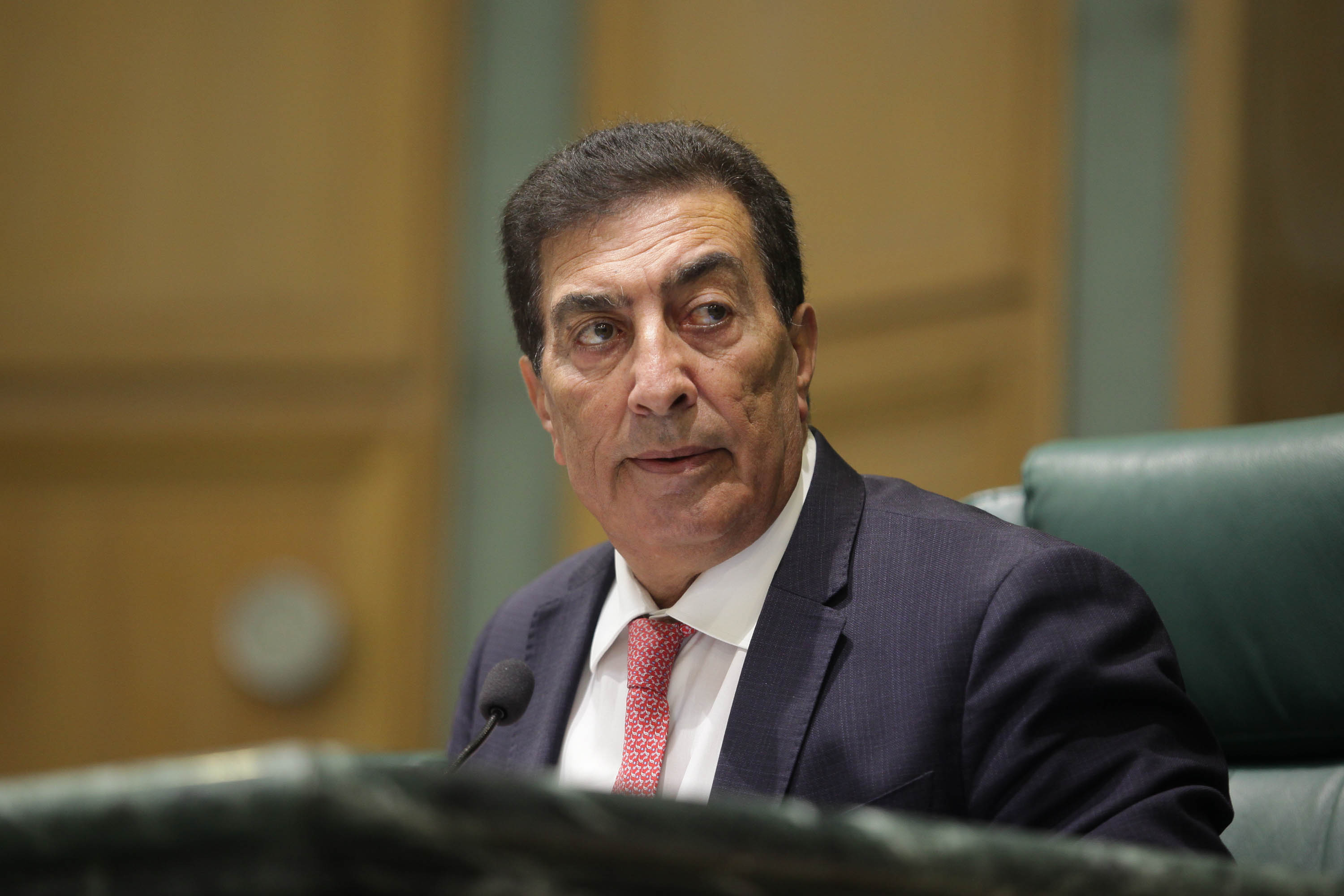 جلسة مجلس النواب الأردني ليوم 16 سبتمبر 2018 تصوير أحمد عبده الشركة الأردنية للصحافة والنشر الدستور ا